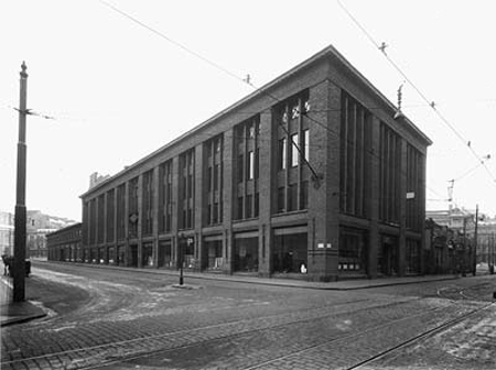 Stockmannin tavaratalon ensimmäinen rakennusvaihe, Sigurd Frosterus, "City-rakennus", 1926. Takana vasemmalla basaarirakennus.